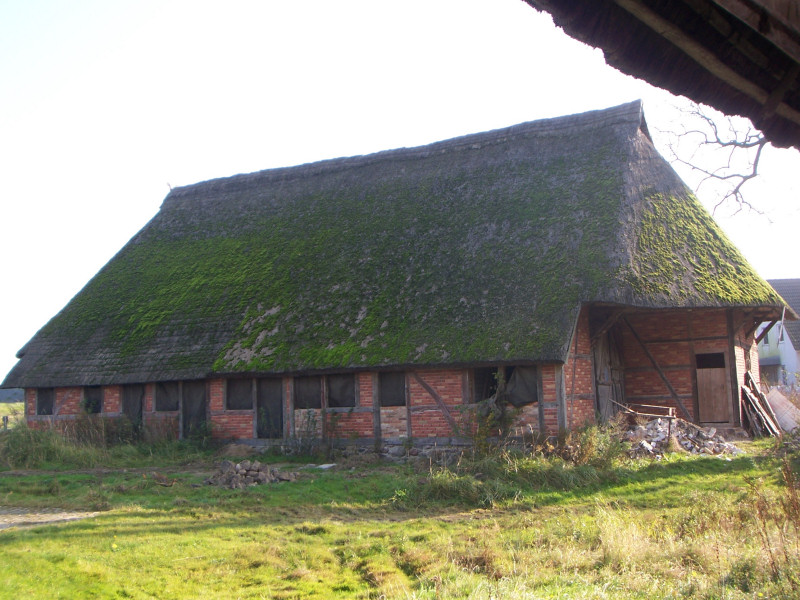 historisches Bauernhaus in Bartenshagen